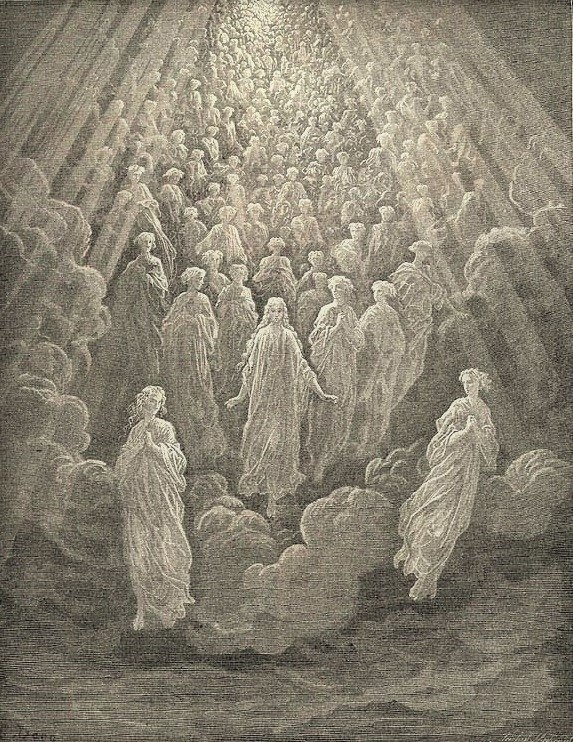 Paradiso, Gustave Doré